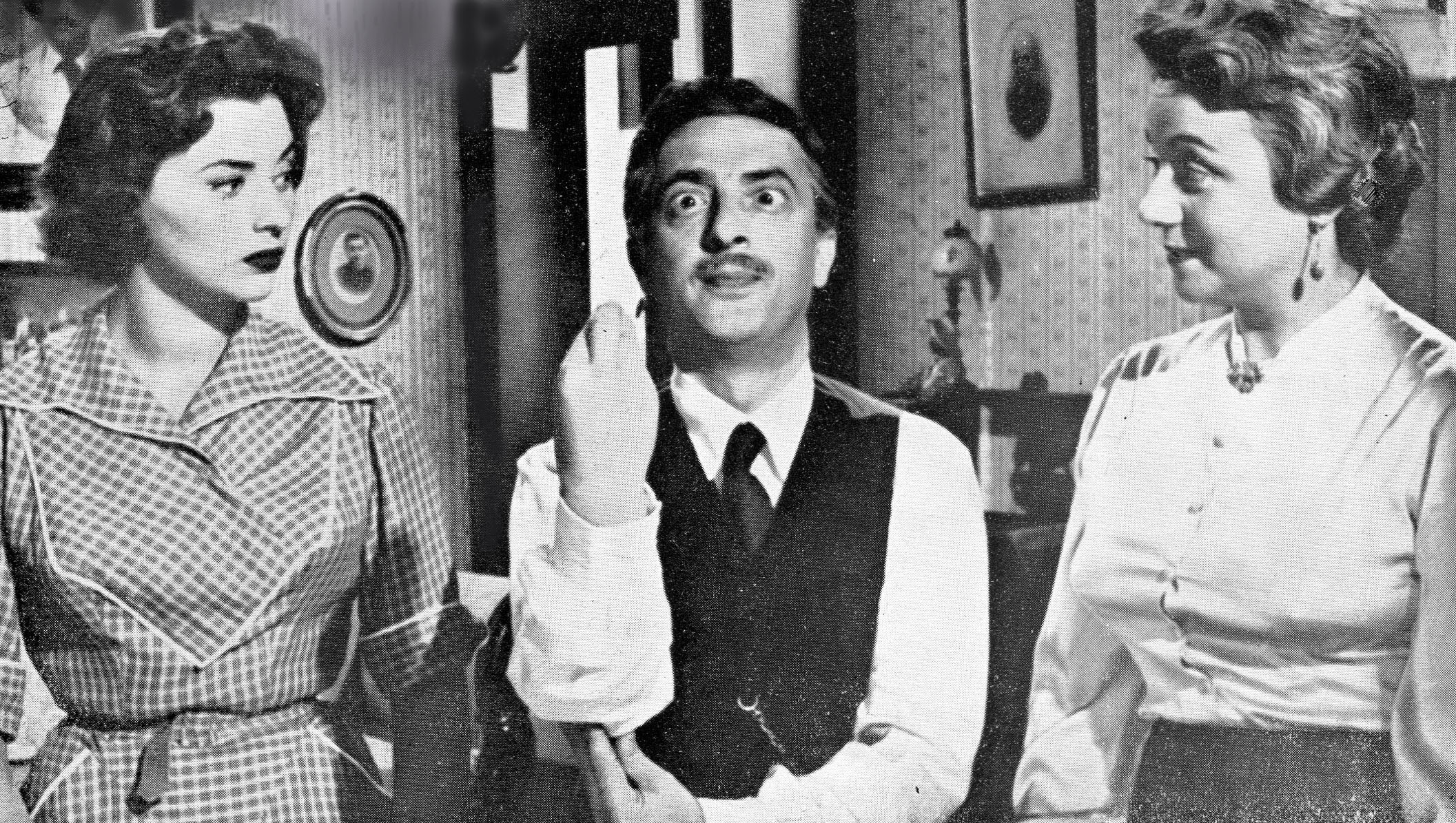 G.Ralli.N.Taranto,C.Matania in "Anni facili"(Zampa,1953)